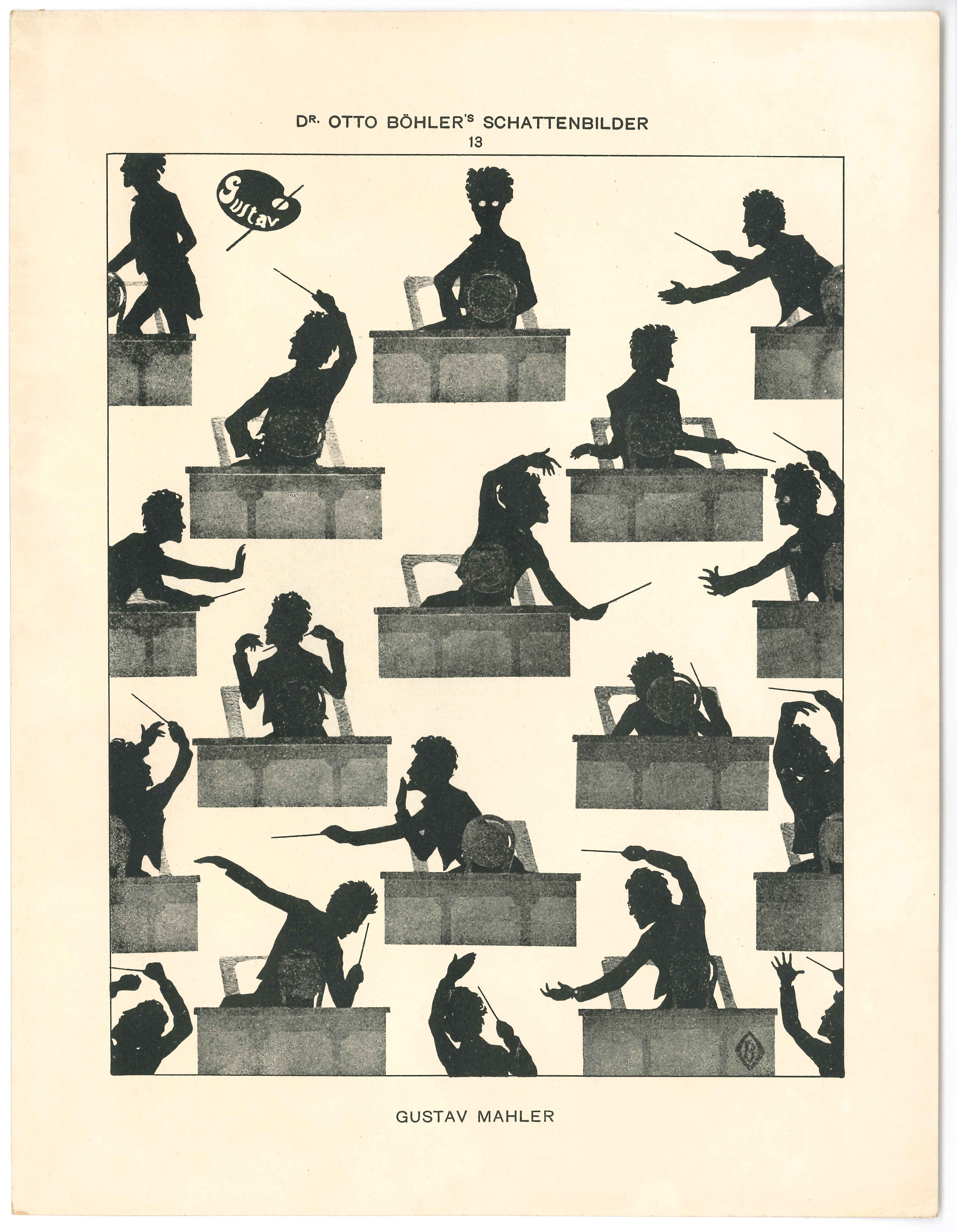 Gustav Mahler, Silhouette, 20 x 26 cm